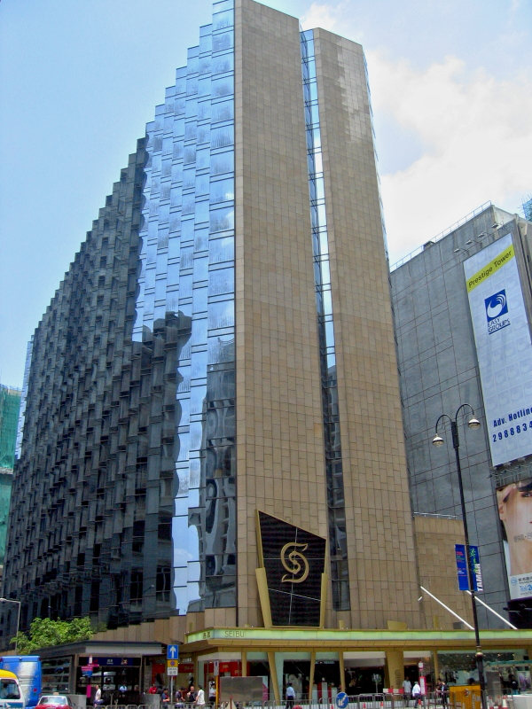 Kowloon Hotel